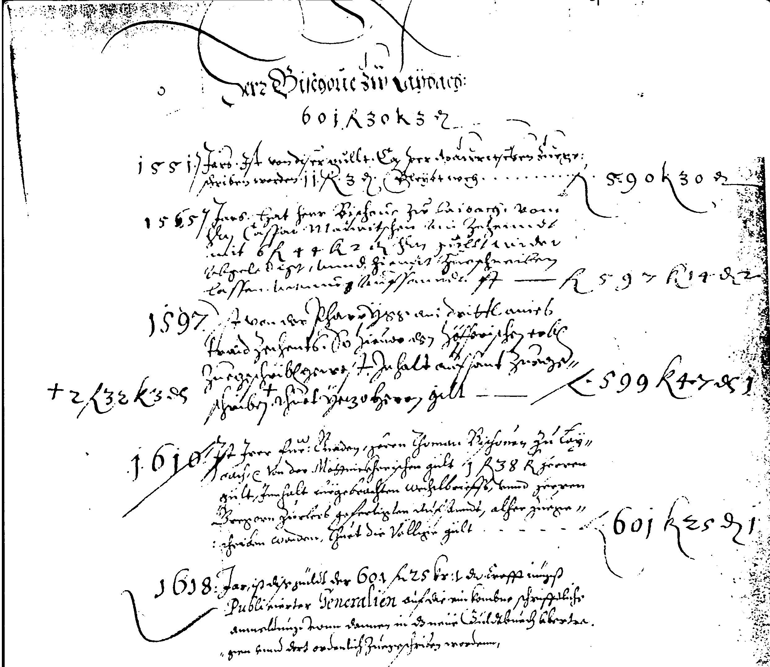 Imenjska knjiga za Kranjsko, vložek Ljubljanskega škofa, 1546-1618.